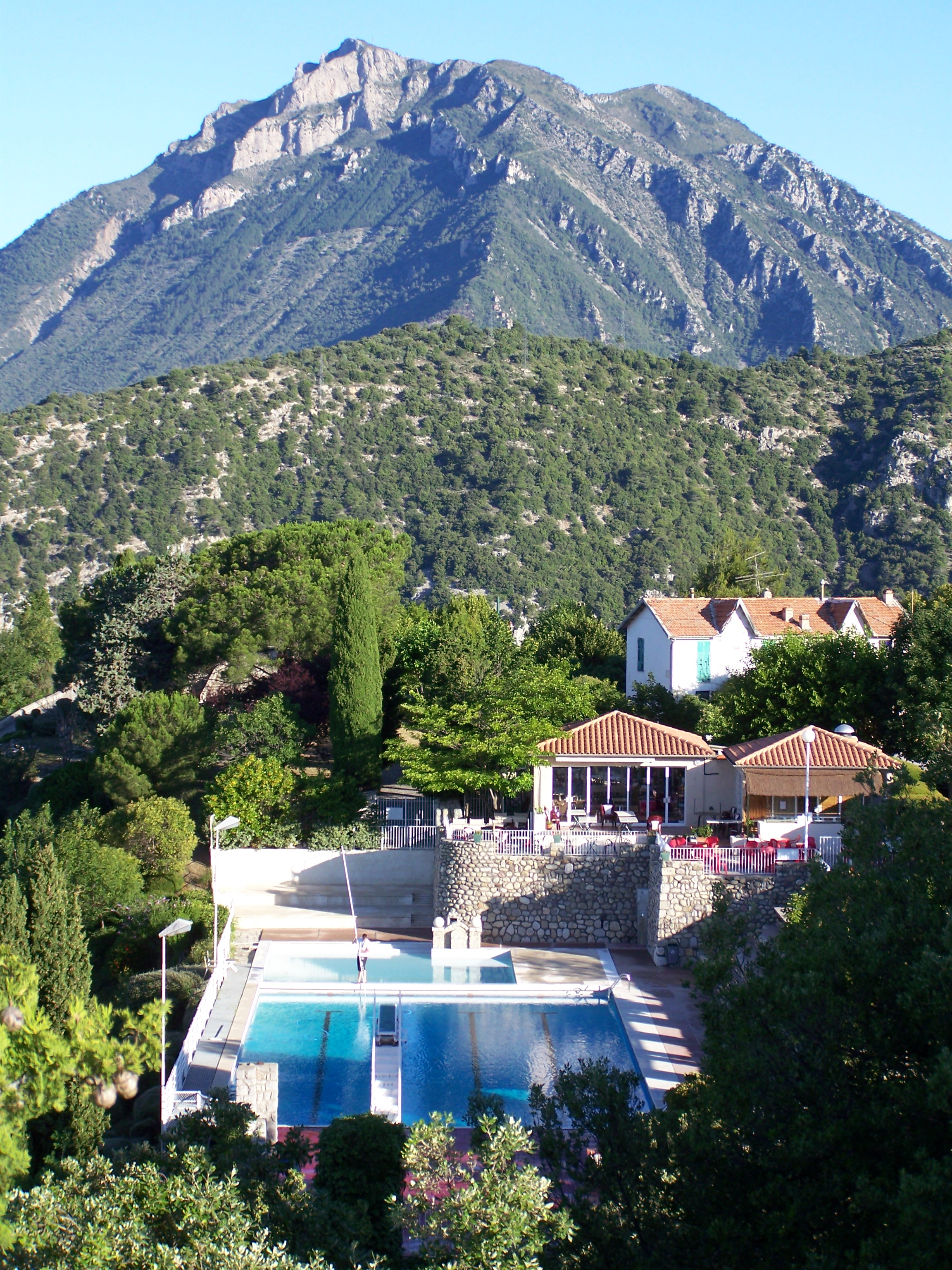 Piscine du village de Levens (Alpes-Maritimes, France) avec en arrière-plan le mont Vial (1551m)